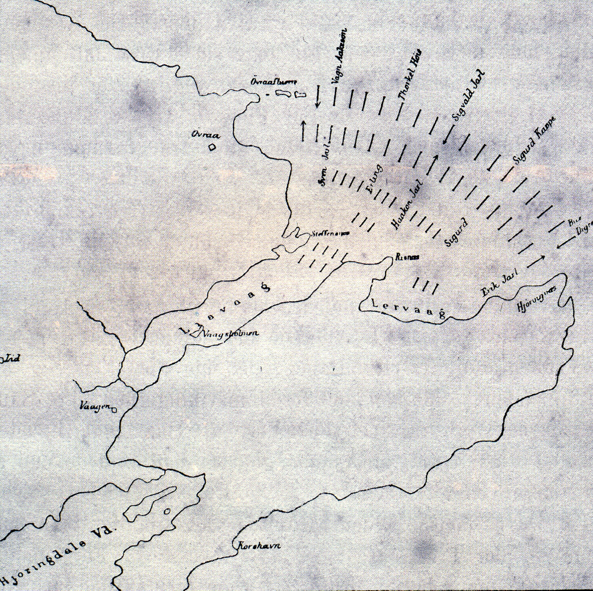 Karte über die Aufstellung der Schlachtformation der Schlacht bei Hjøringavåg, wie sie sich V. Voss vorstellte.